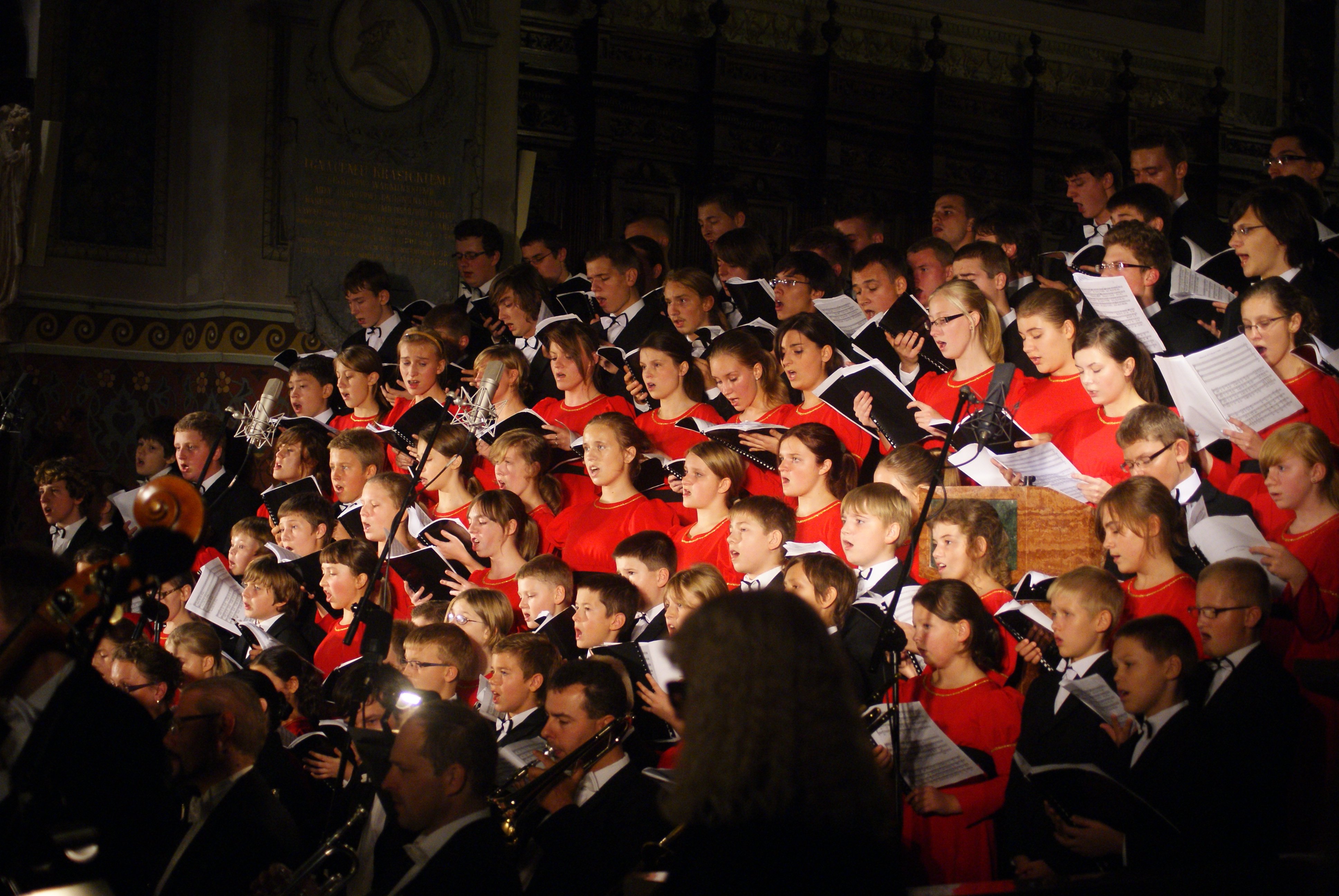 Pueri et Puellae Cantores Plocenses podczas koncertu mszy żałobnej Requiem W.A. Mozarta w Bazylice Katedralnej w Płocku.